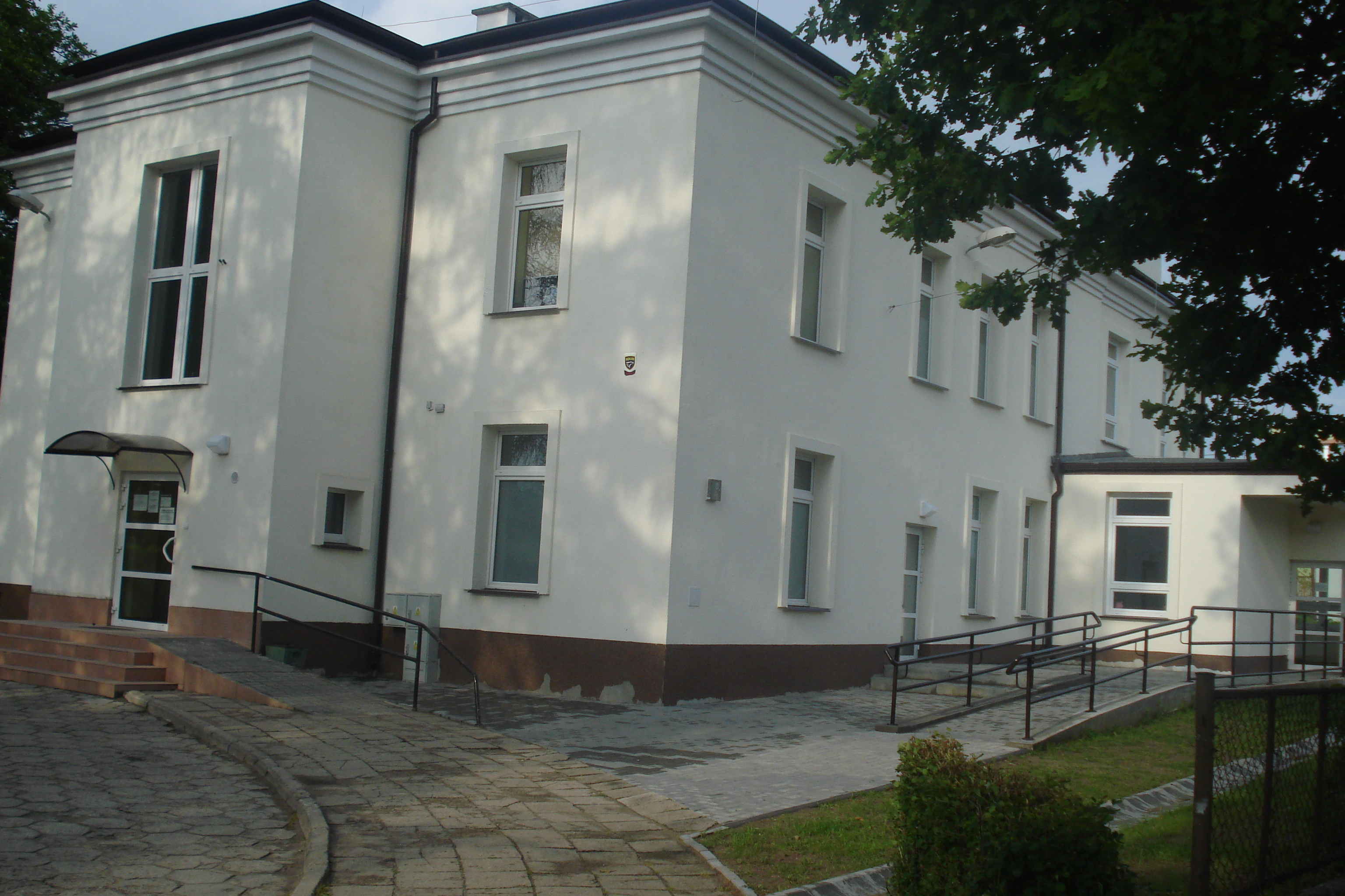 Barczewo, przychodna zdrowia